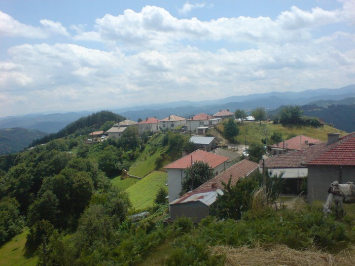 Изглед от село Гърнати, Област Смолян.